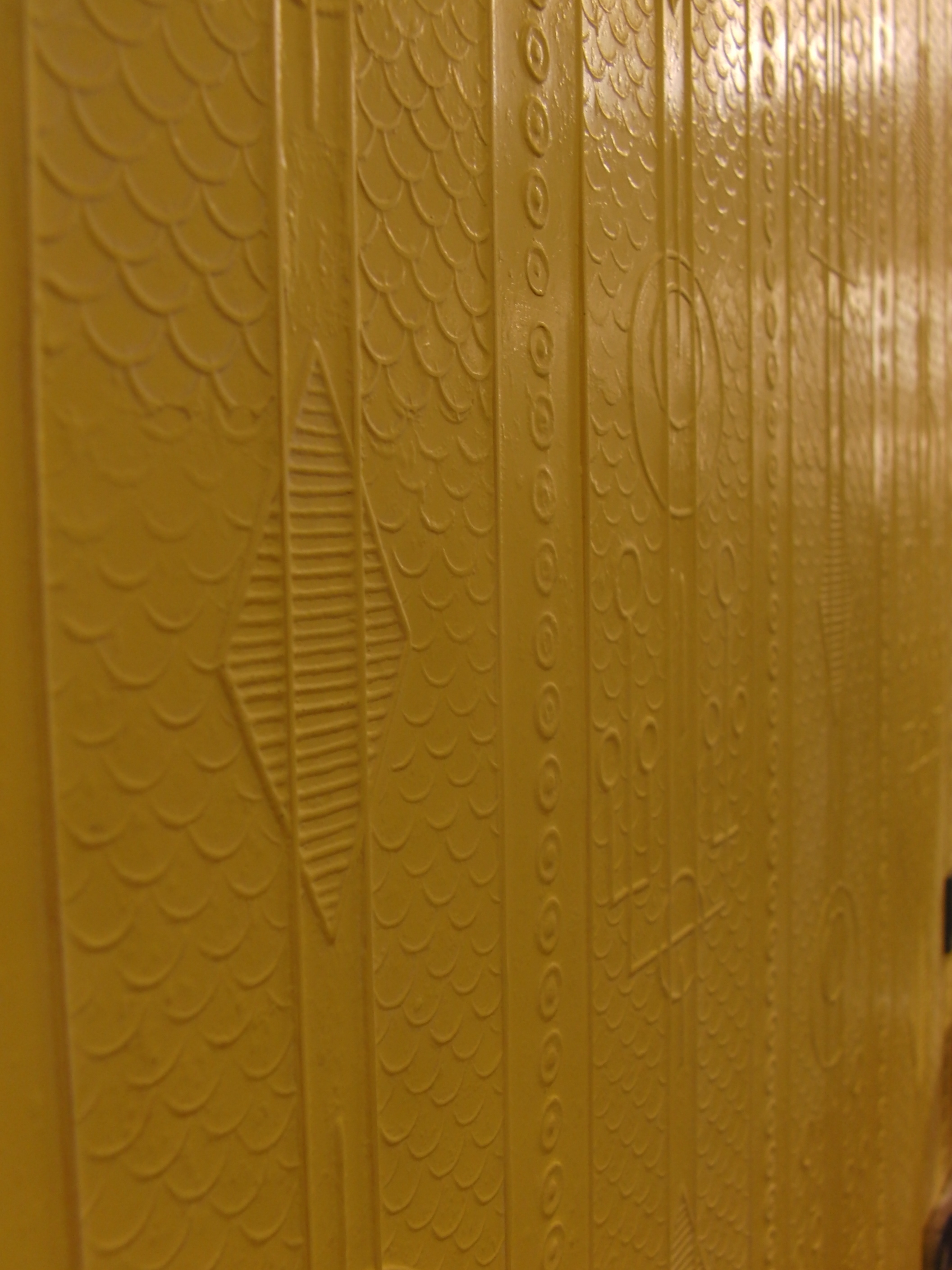 "Sokolniki" retro train (Ретропоезд "Сокольники")